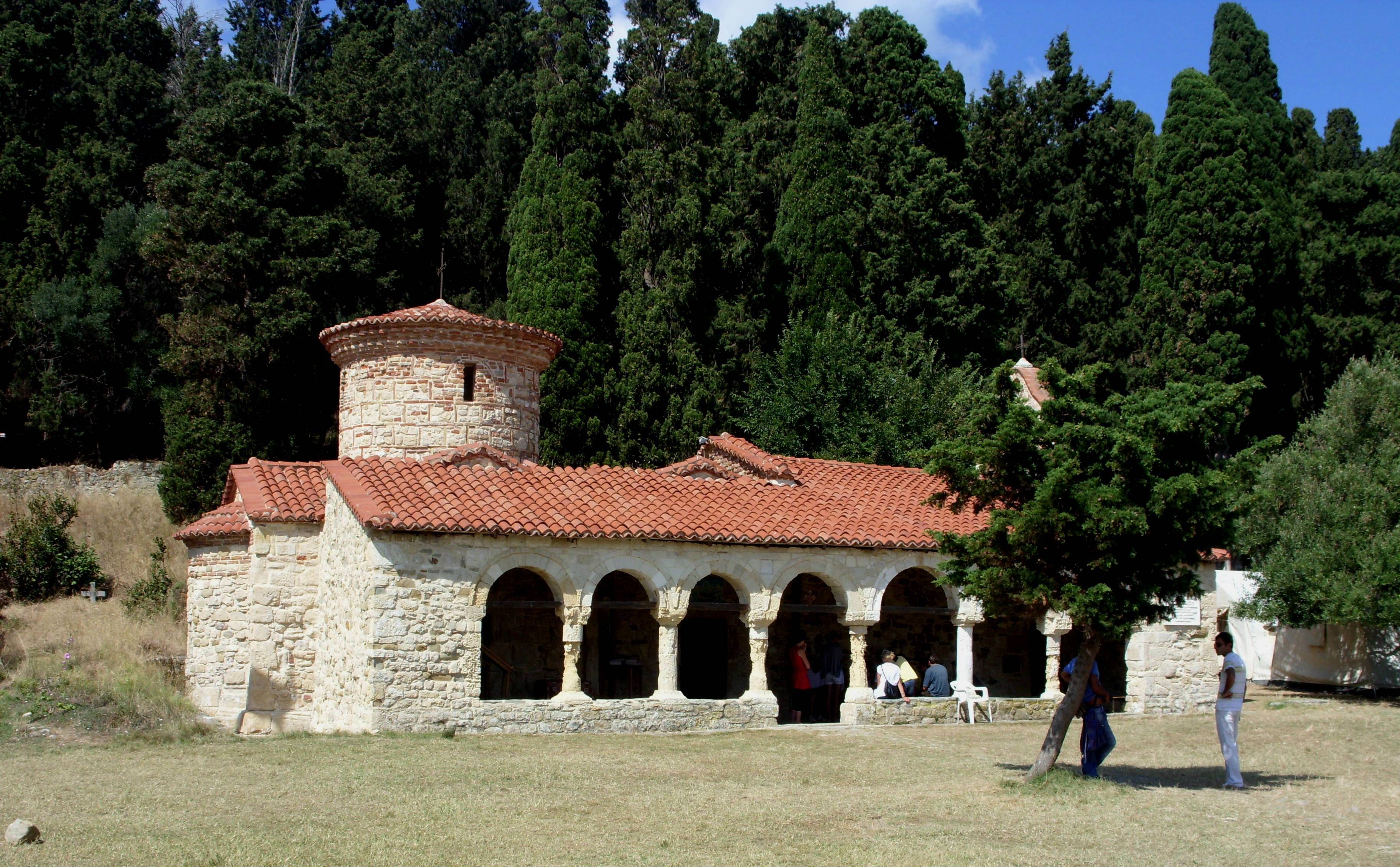 Kloster Zvernec an der Lagune von Narta nördlich von Vlora (Albanien), Klosterkirche, erbaut im 13./14. Jhdt.